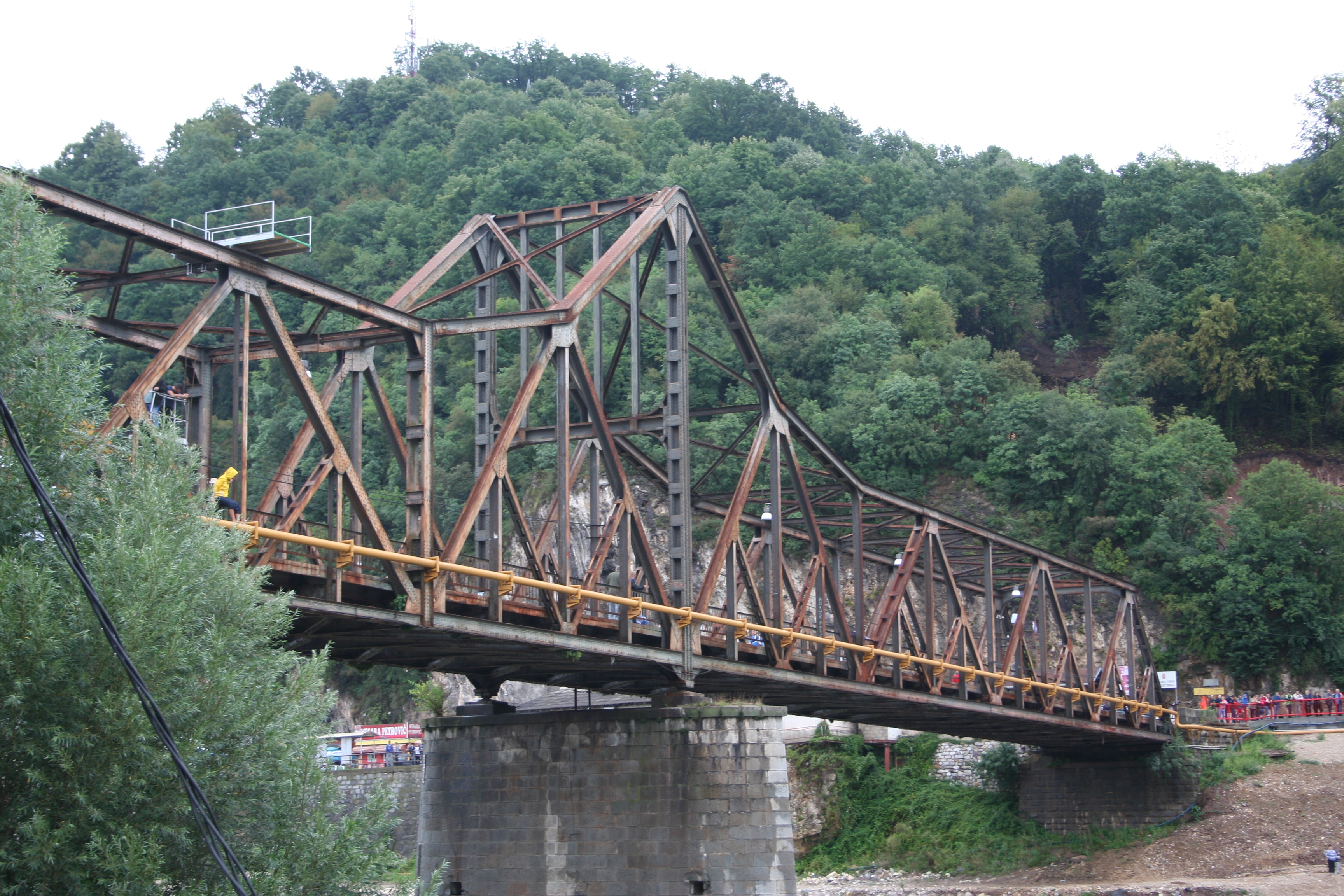 Most kralja Aleksandra I Karađorđevića na Drini, između Malog Zvornika i Zvornika u Republici Srpskoj